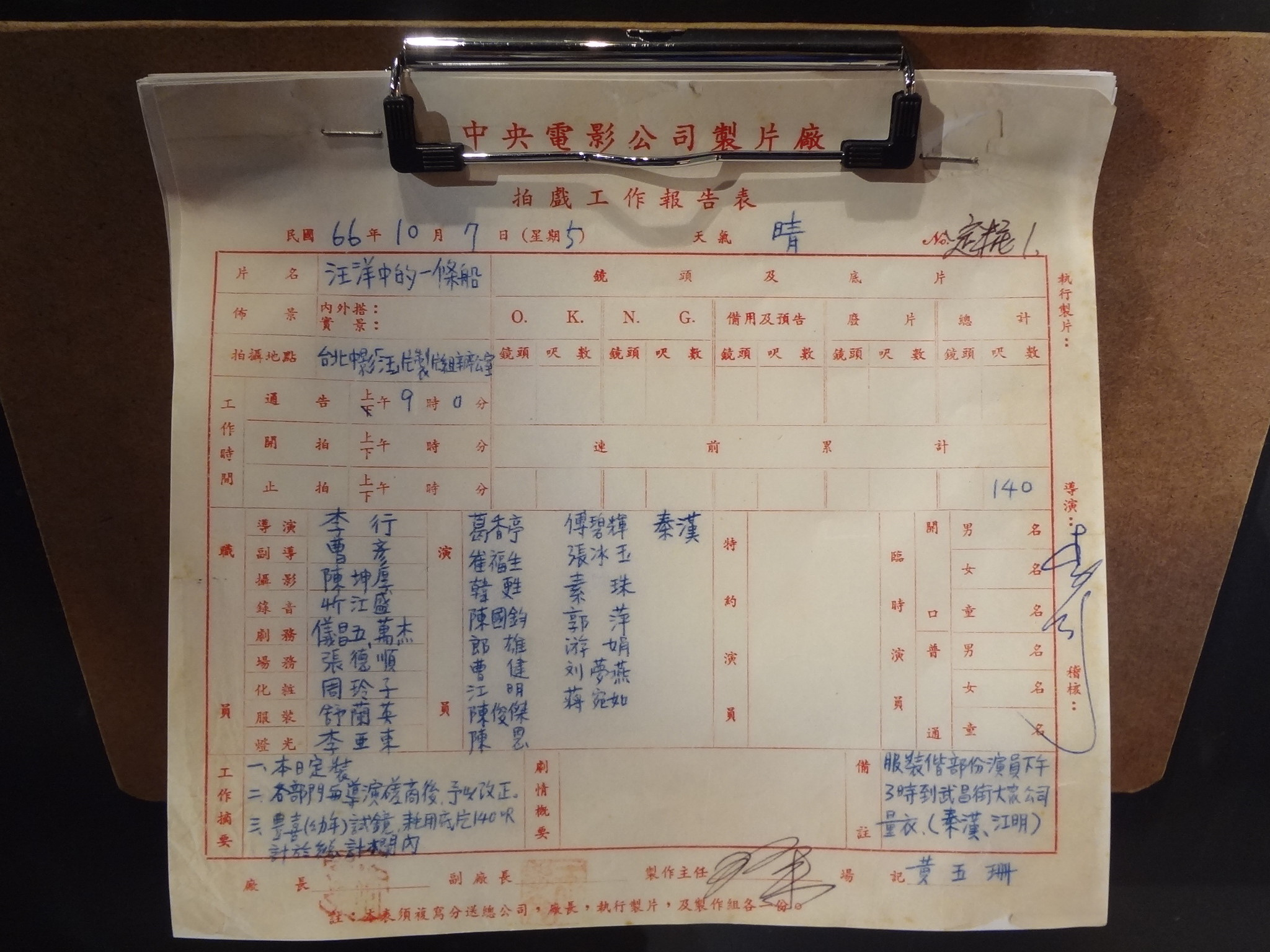 金馬50風華展展示的中央電影公司電影《汪洋中的一條船》拍戲工作報告表，日期為1977年（中華民國66年）10月7日。